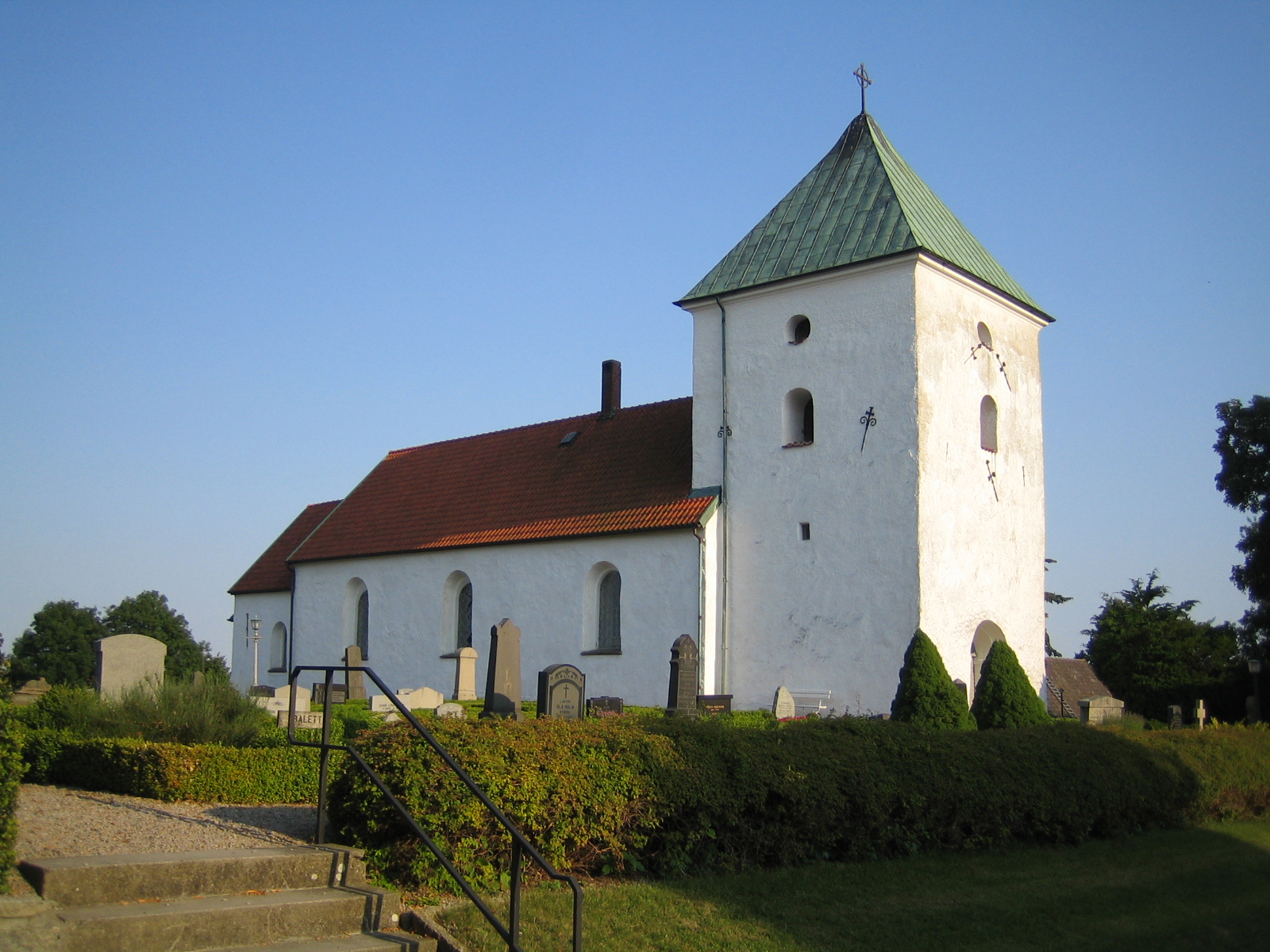 Sövestads kyrka